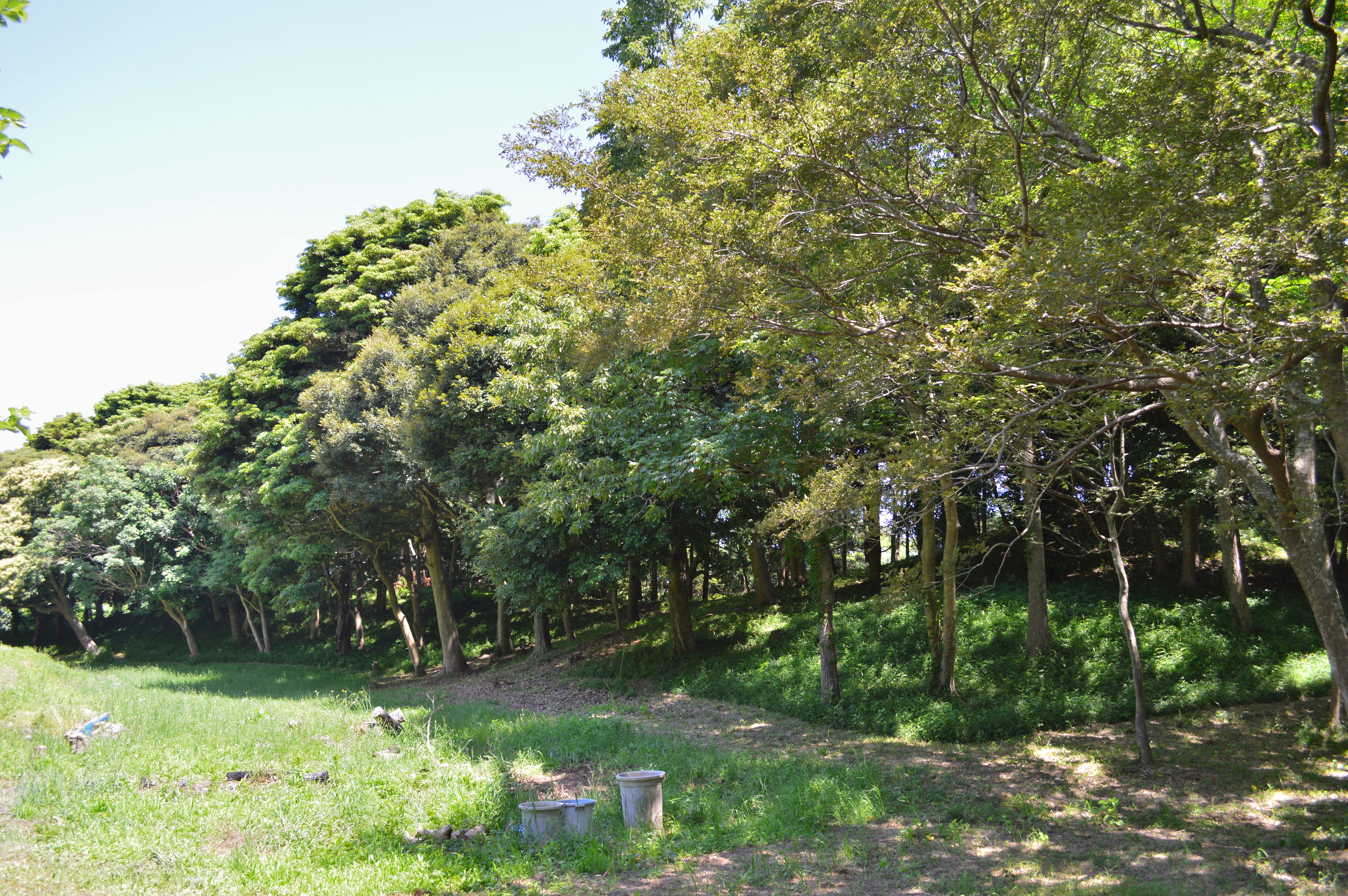 夫婦塚古墳